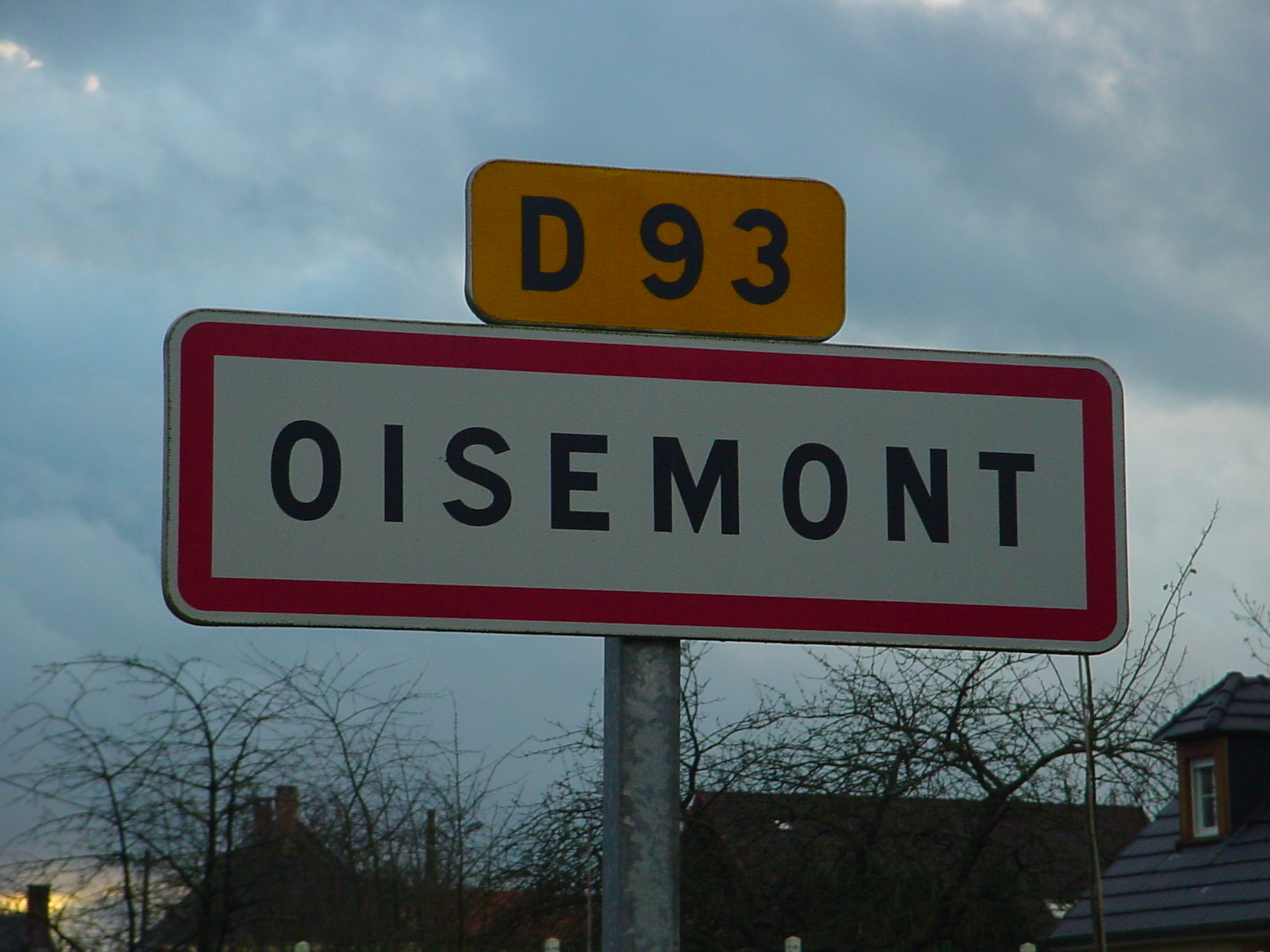 Paneau_d'entrée_d'agglomération_de_Oisemont_(Somme(80)-France).